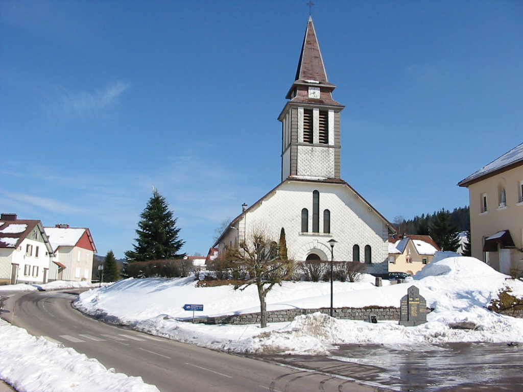 Xonrupt-Longemer Commune des Vosges Église et monument aux morts Photographie personnelle, prise le 15 mars 2006 Copyright © Christian Amet